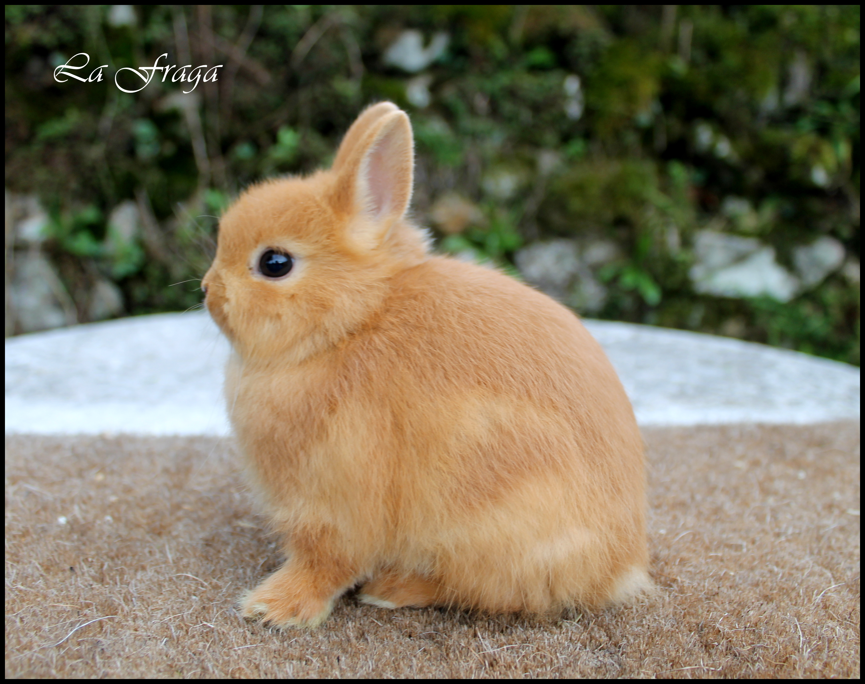 Netherland Dwarf Rabbit